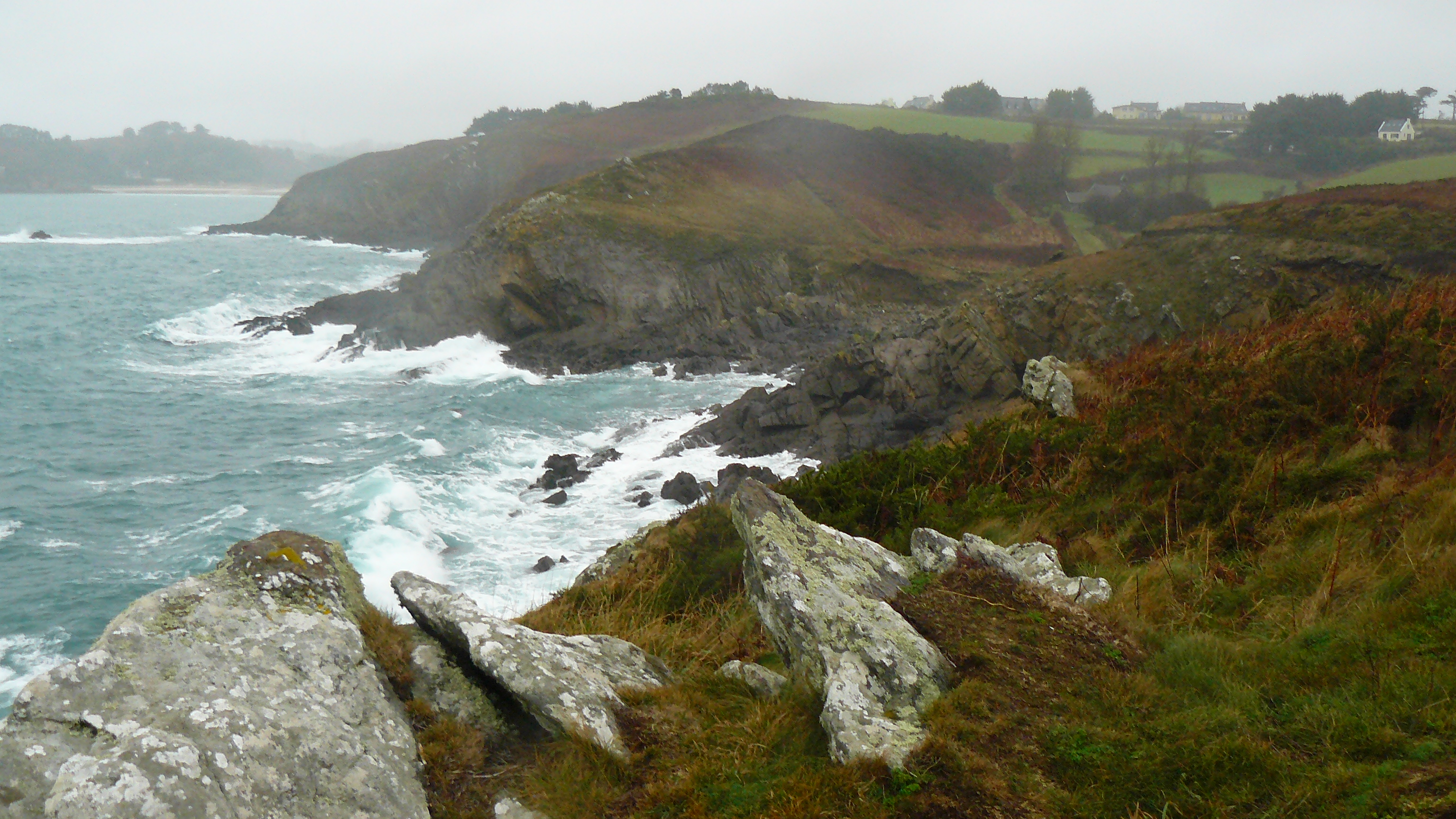 Vue de la crique de Locméven à partir du GR34 lors d'une tempête - Chapelle de Locméven en arrière plan.